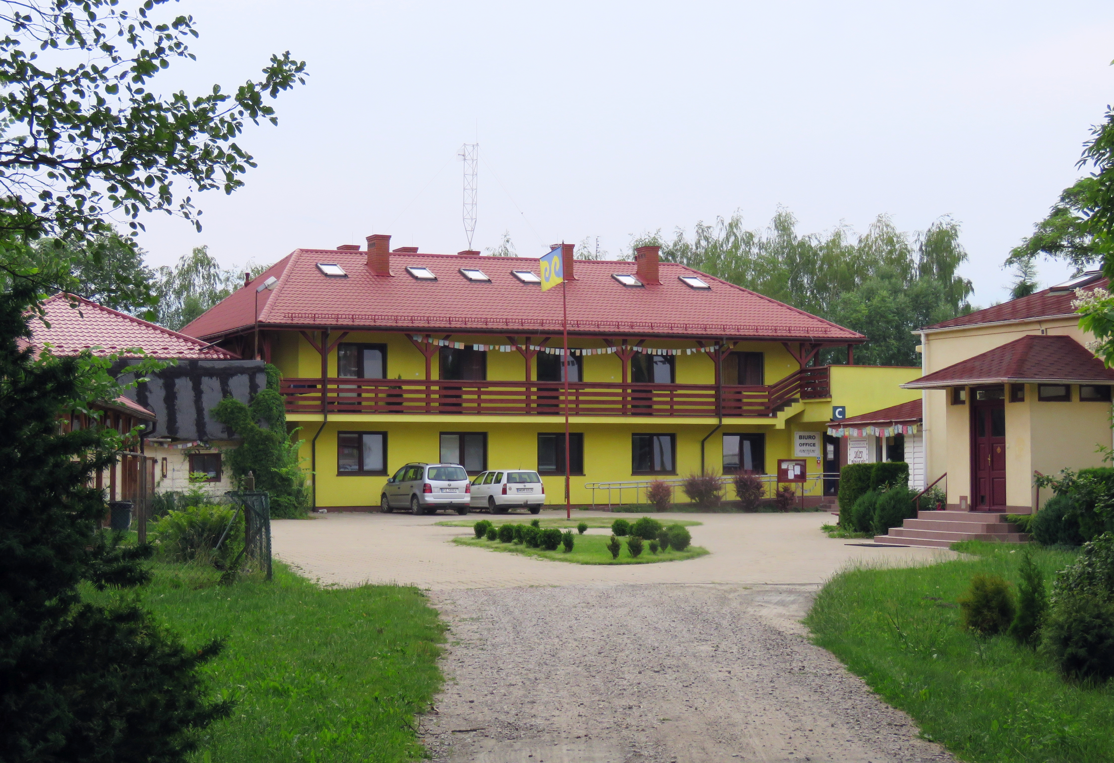 Grabnik - główna siedziba Związku Buddyjskiego Bencien Karma Kamtsang